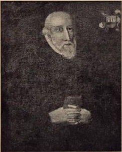 Biskop Frants Berg i Oslo.